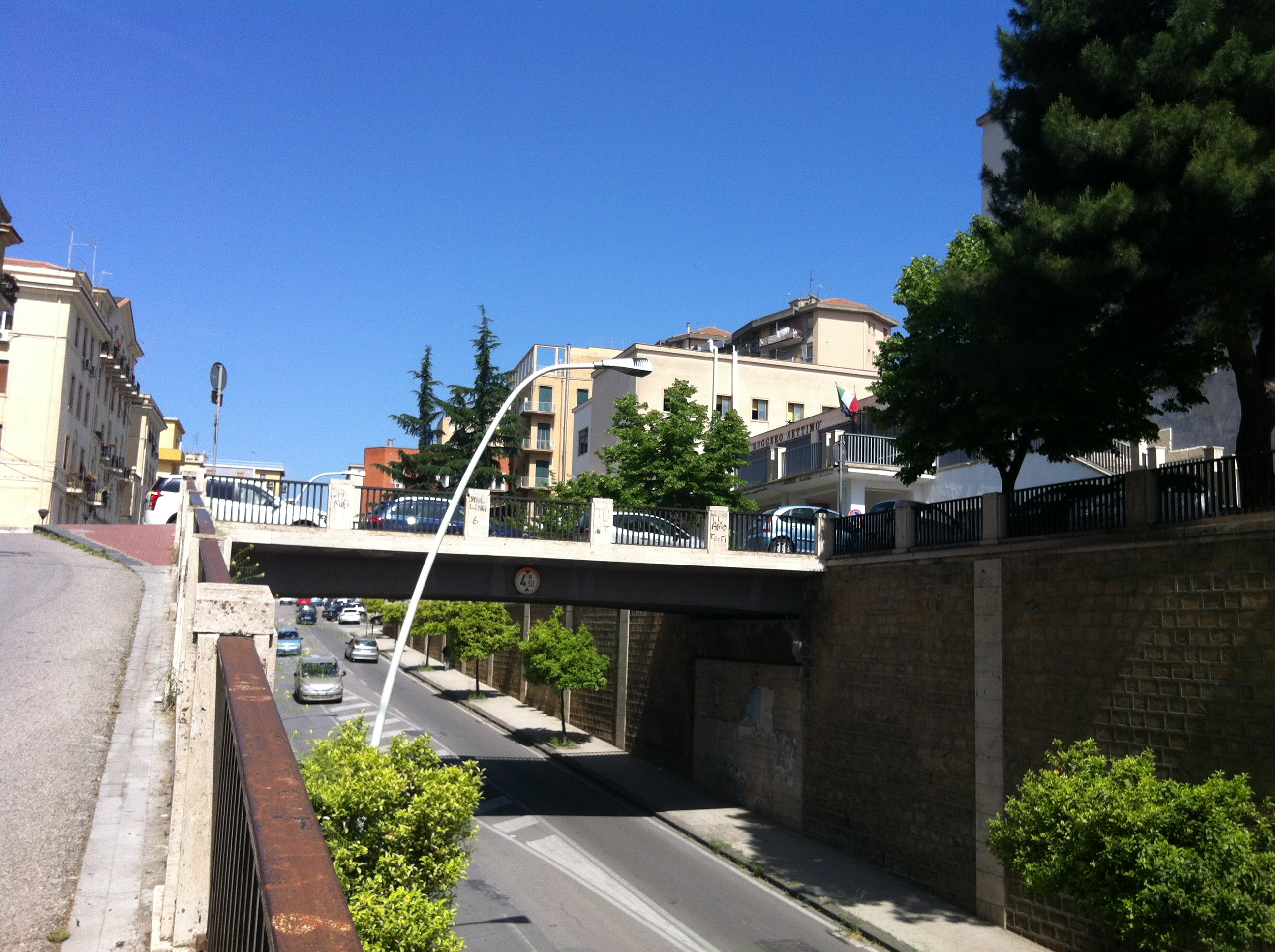 Liceo Classico Ruggero Settimo